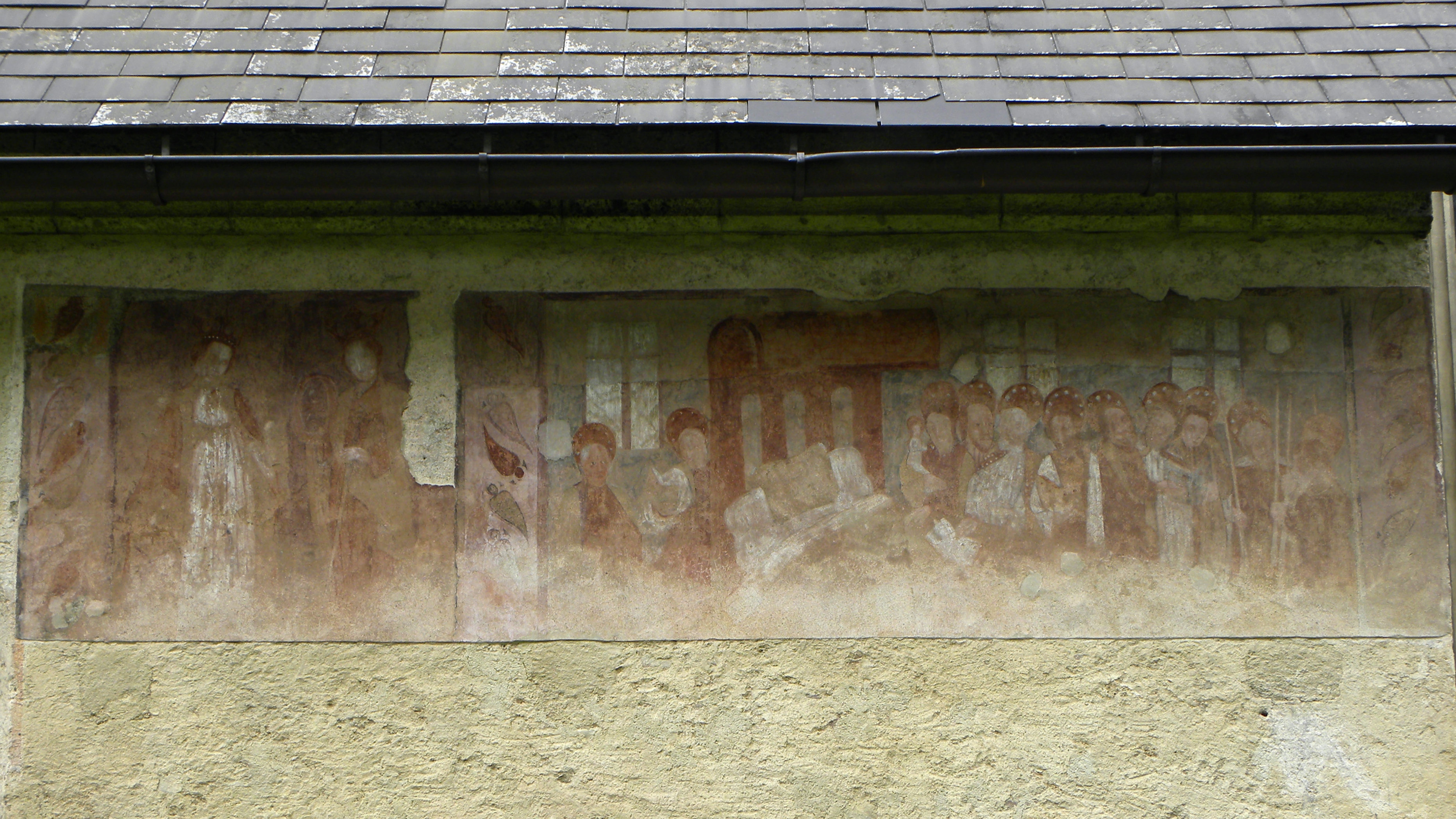 Fresko an der ehemaligen Sakristei, heute Loretokapelle, der Kirchenfestungsanlage hl. Oswald. Im linken Feld sind die hll. hl. Katharina und Barbara zu sehen, im rechten Feld eine Marientod-Darstellung.